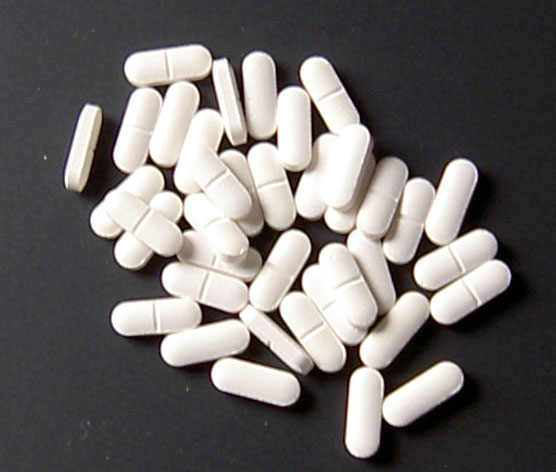 Stillnox